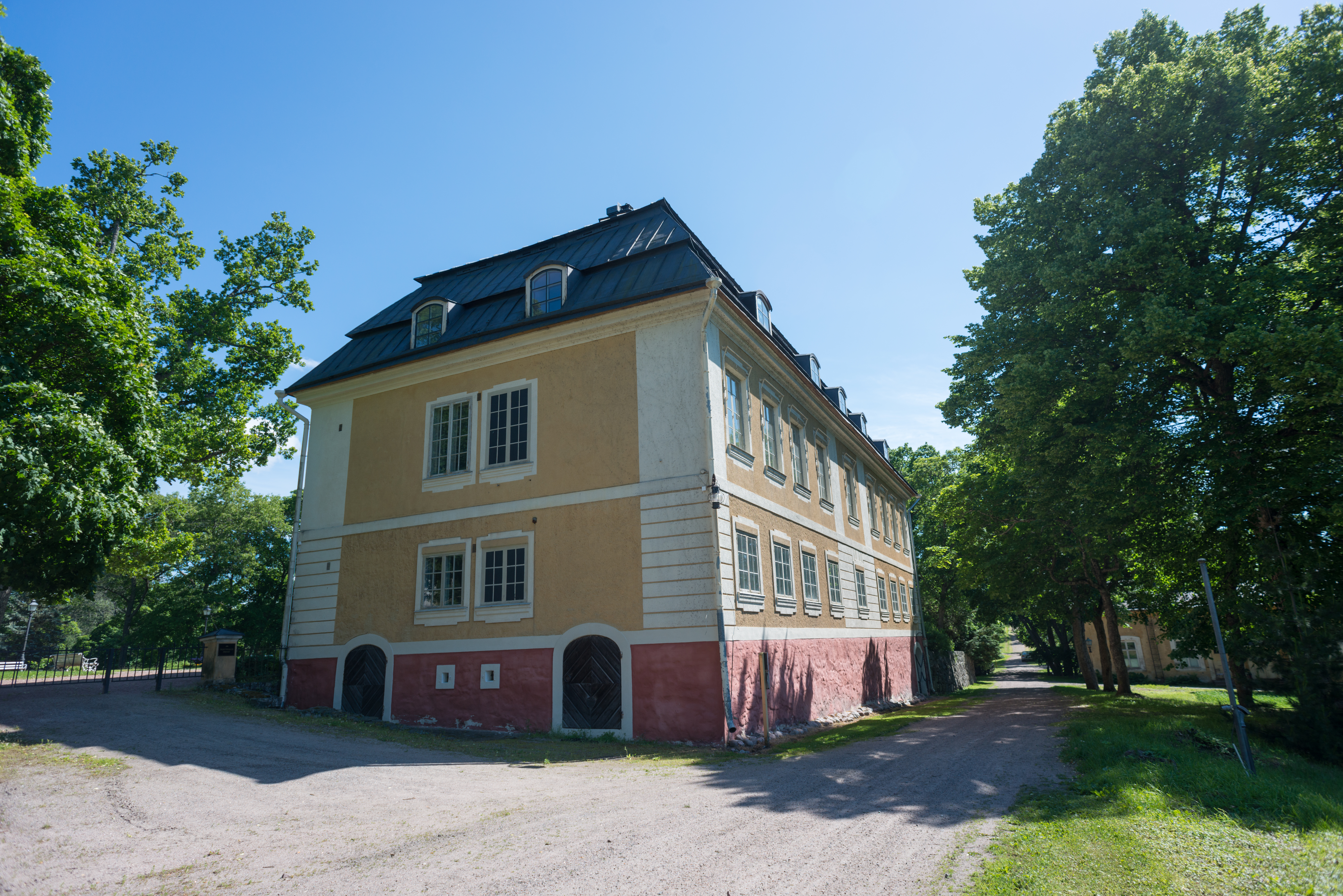 Teijon kartanon päärakennus takapuolela